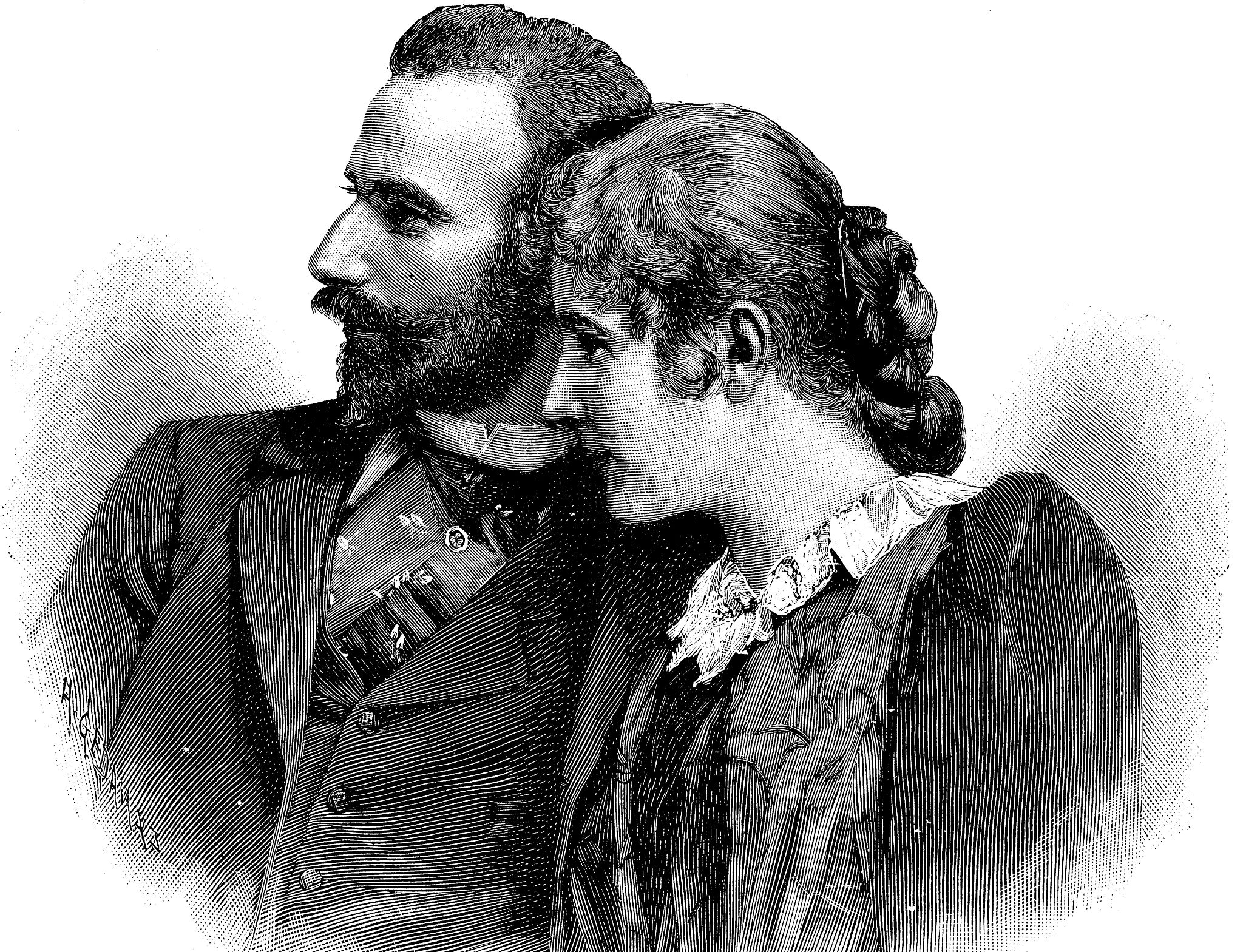 Katharina Jensen (1875–1945) wurde kurz vor ihrer Hochzeit mit Prinz Ernst von Sachsen-Meiningen zur „Freifrau von Saalfeld“ erhoben